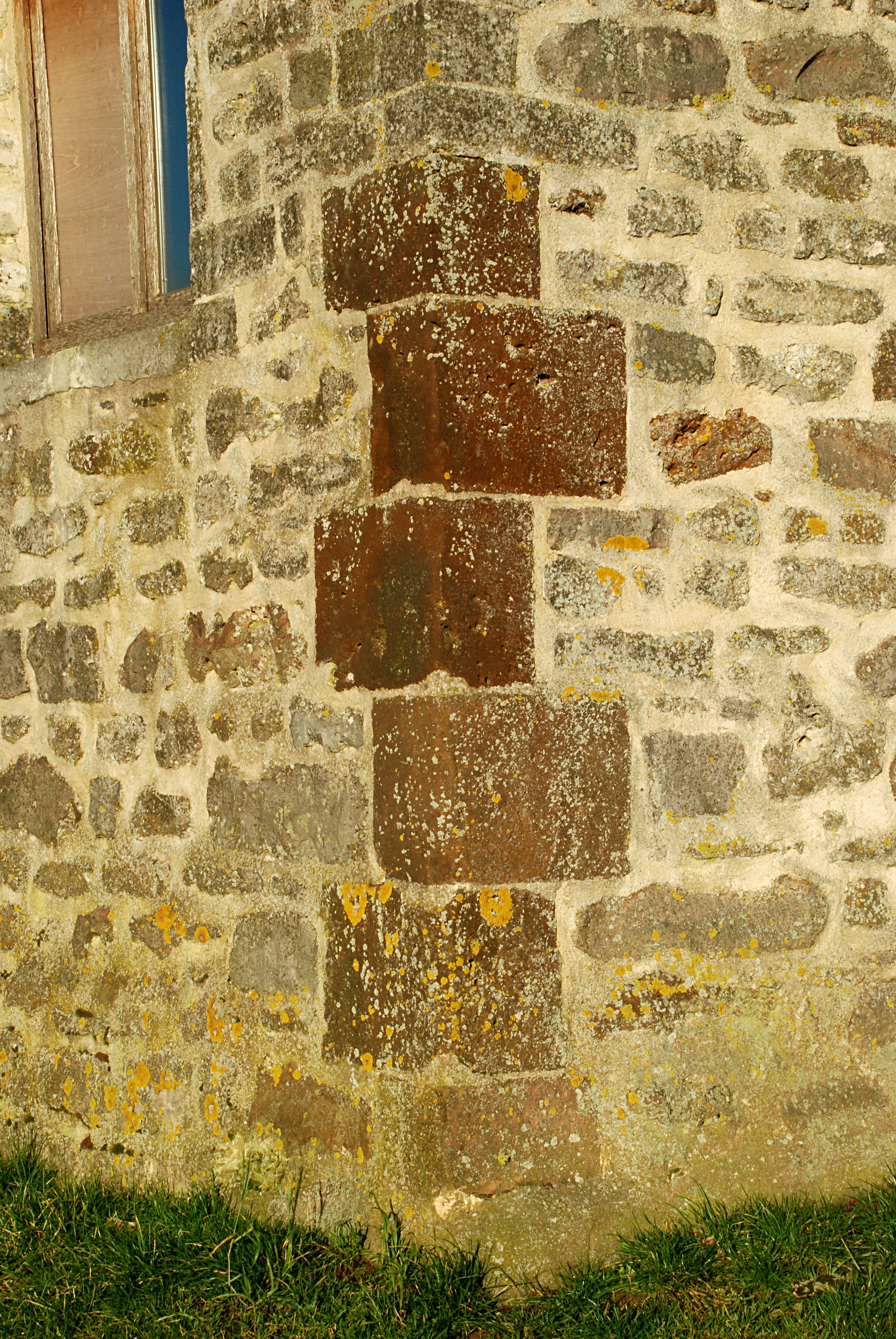 Belgique - Brabant wallon - Chaumont-Gistoux - Longueville - Chapelle du Chêneau